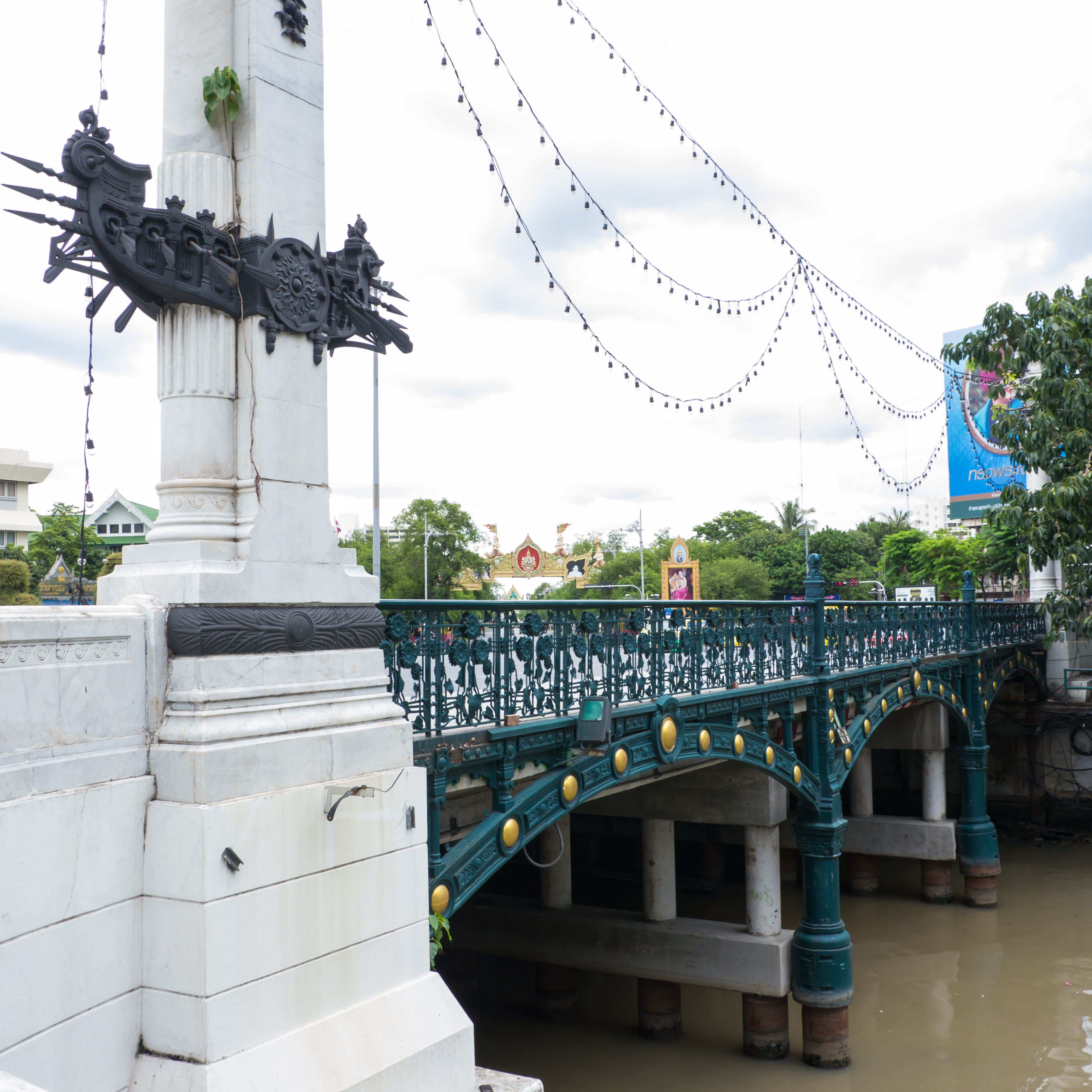 สะพานผ่านฟ้าลีลาศ